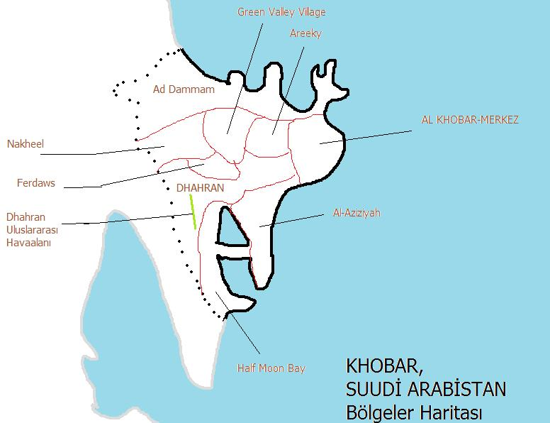 Khobar Şehiriçi Bölgeleri ve Havalimanı'nı gösteren bir harita.